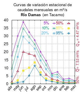 Curvas de variación estacional del río Damas (Osorno) en Tacamo. This plot was created with Gnuplot.